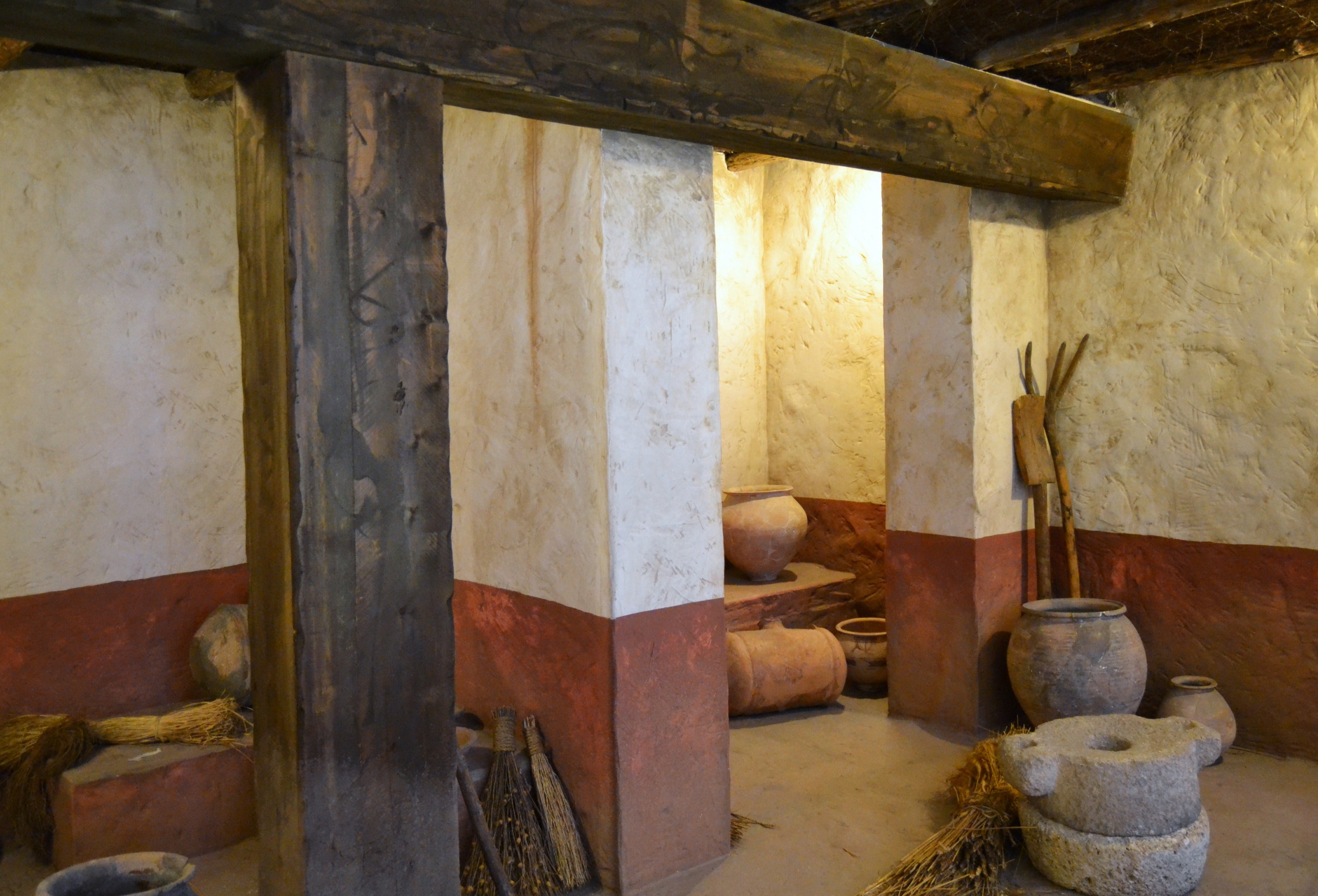 Recreació d’una casa ibèrica del segle VIII aC al Museu de Prehistòria de València.